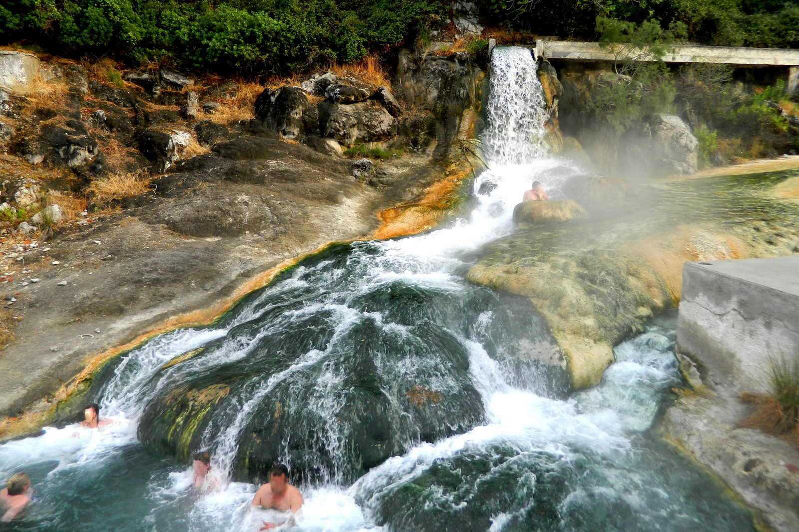 Dzikie kąpielisko, przy nieczynnym już zakładzie wodolecznictwa w Termopilach. Wyczuwalne są związki siarki - ograniczają skłonność skóry do pocenia się. Temperatura wody 40 stopni - wraz z naturalnym, silnym masażem, dobroczynne po nużącej, wielogodzinnej jeździe autem. Obok posterunek policji drogowej (tablice gr: ΤΡΟΧΑΙΑ, Τροχαία) i sporo miejsca do zaparkowania, dla TIR także nocą. Wjazd i wyjazd auta osobowego z autostrady to 1,65 Euro. Można wszakże czynić to bezpłatnie już w Lamii lub od strony Agios Konstantinos, to zależnie w którą stronę kogo drogi prowadzą. Pomiędzy Termopilami, a Ag. Konstantinos leży jeszcze popularna, uzdrowiskowa i nadmorska, piękna Kamena Vourla. Nie wiem jak z płatnością wjazdu/zjazdu. Nieco chłodniejsze, rozleglejsze źródła, przydatne także do rodzinnego popływania, 34 stopnie, podróżny znajdzie w pobliżu Termopil, nieco w stronę Lamii, zawsze ową drogą lokalną, u podnóża gór. W kolejnej po nich miejscowości, zawsze kierując się wzdłuż góry, oferowane sa dobre, czyste, tanie pokoje gościnne. W pobliskiej Lamii, na zamku, warte polecenia, małe, ciekawe, reprezentatywne Muzeum Archologiczne. Wszędzie w opisanych miejscach niewymuszona życzliwość i uprzejmość plus dobre wspomnienie o poprzednich Polakach.